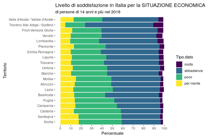 File realizzato con RStudio con dati Istat